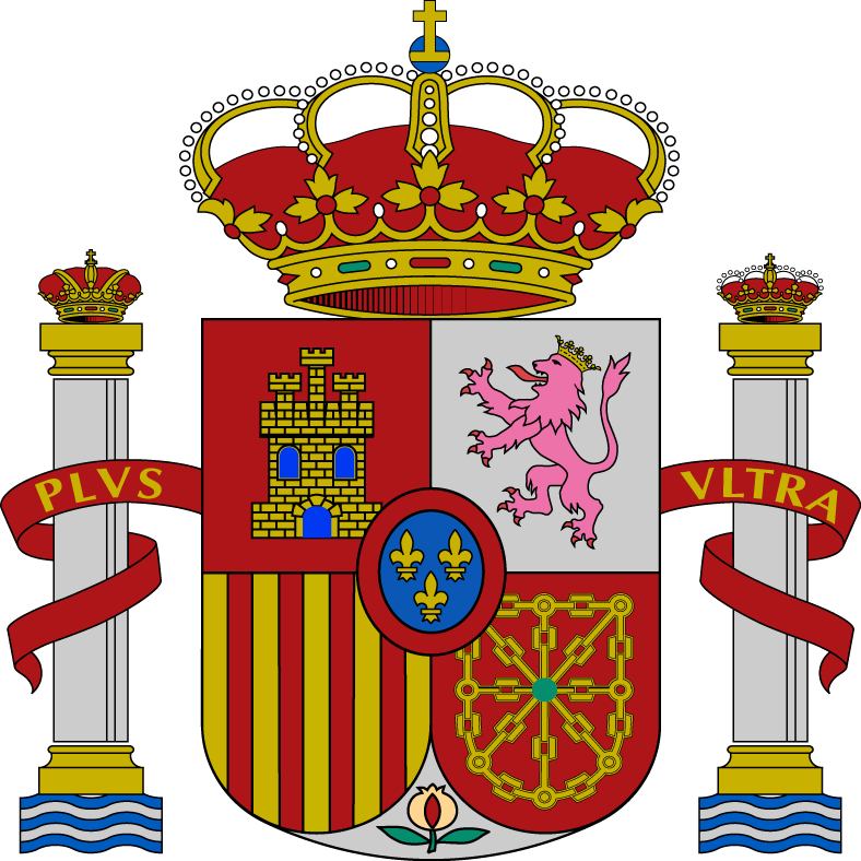 Escudo de España, modelo oficial.